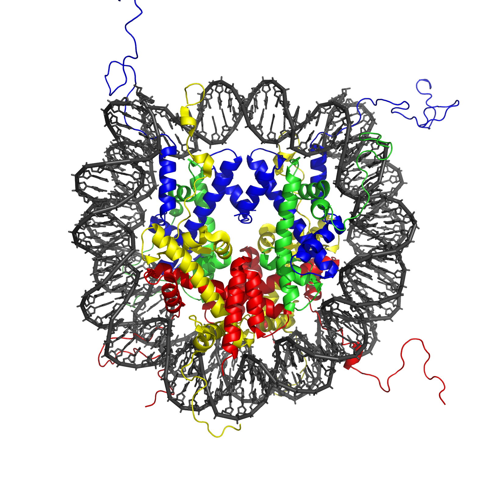 PDB: 1KX5​